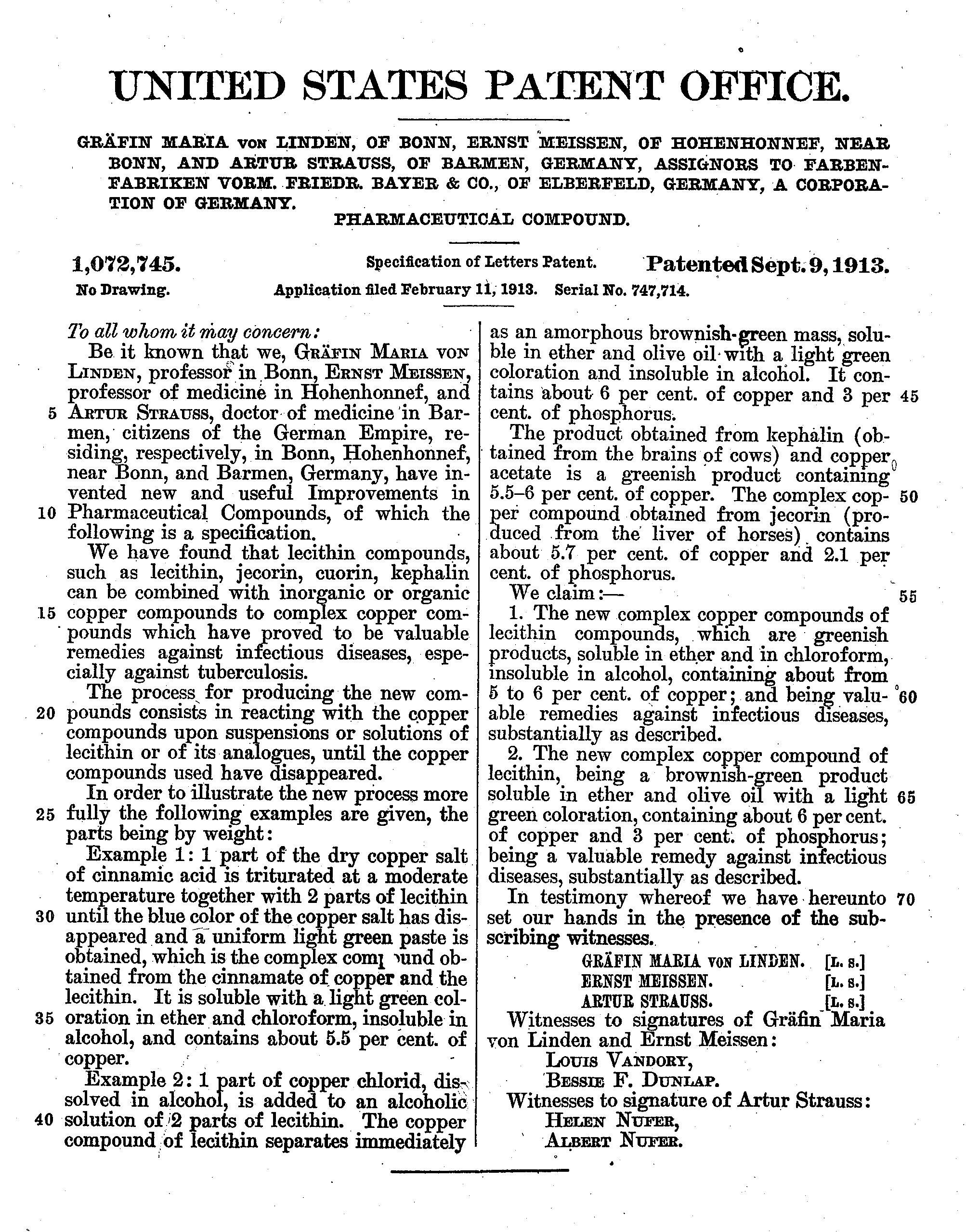 Patent sobre l'ús de les sals de coure com a desinfectant en operacions quirúrgiques.